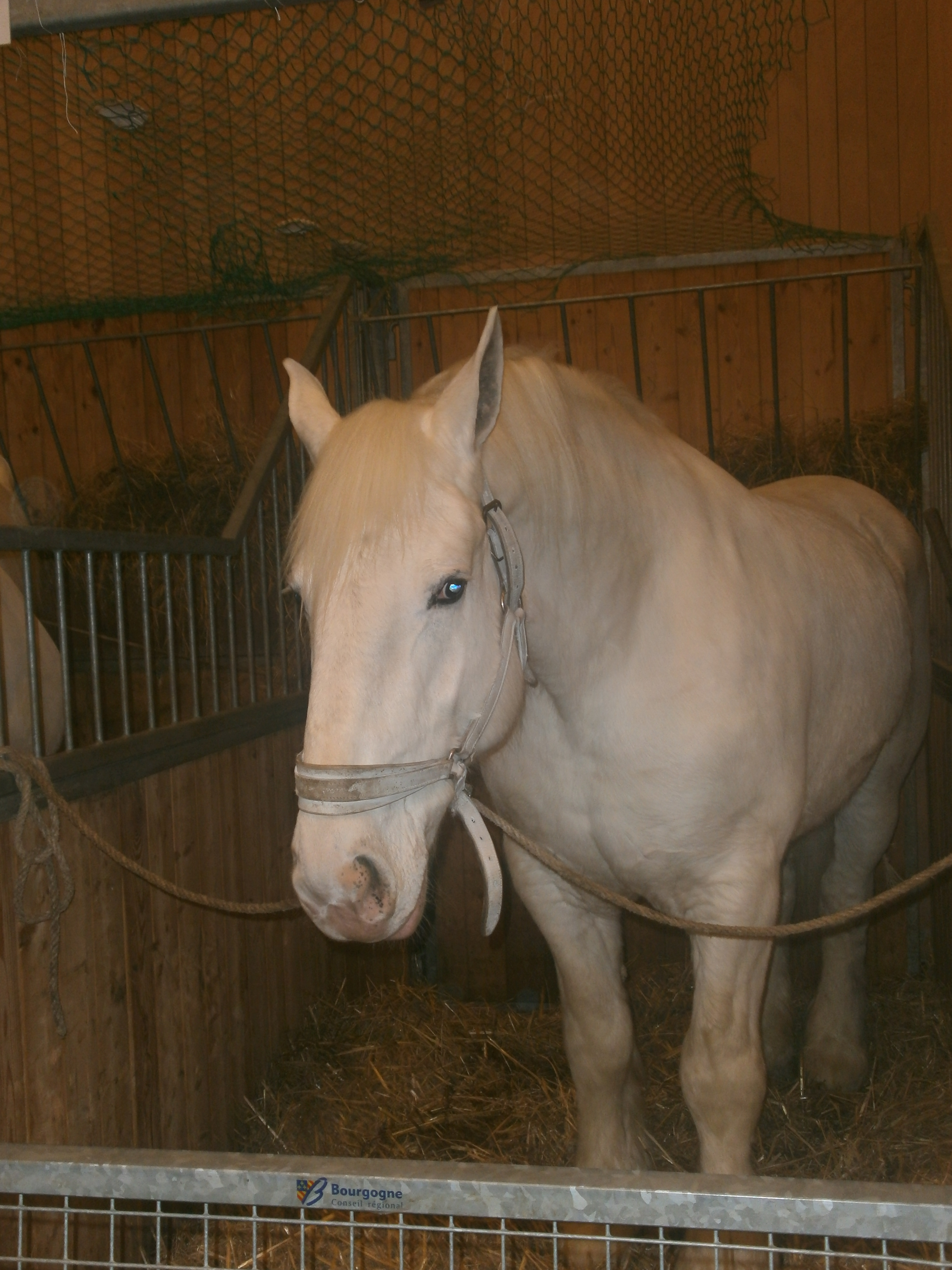 Cheval boulonnais au salon de l'agriculture 2013